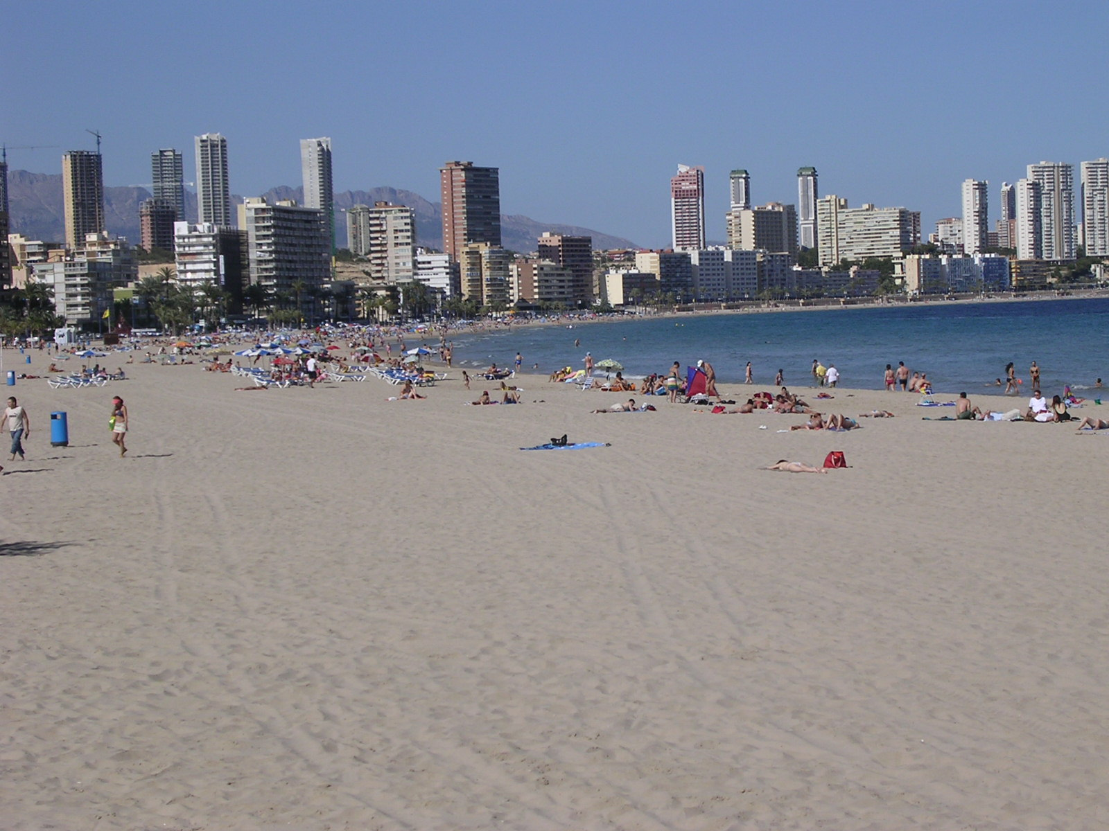 Benidorm